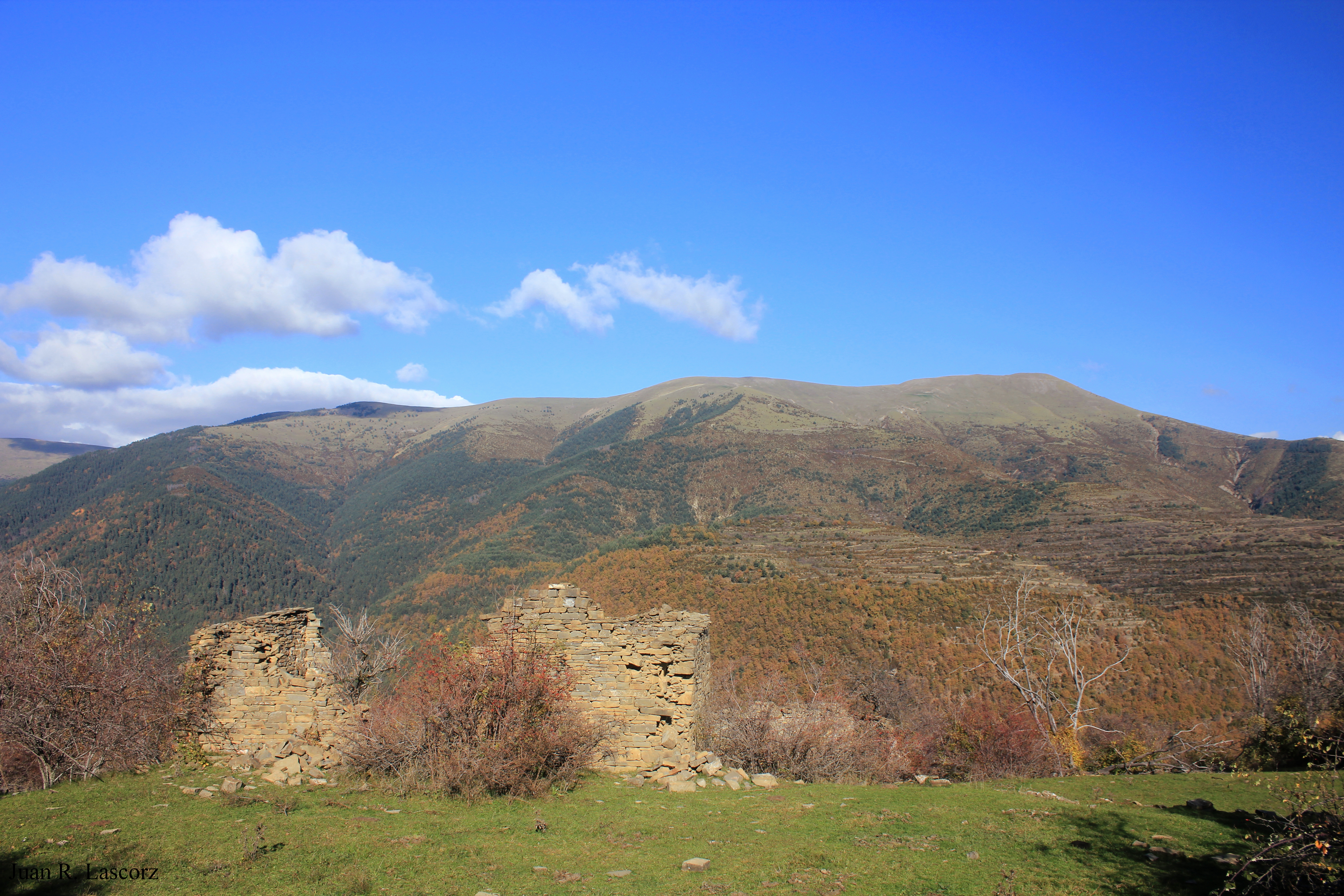 Aragonés: O macizo d'a Manchoya u sierra d'a Manchoya sobre a valle d'Otal en Sobrepuerto. Envista dende Basarán.